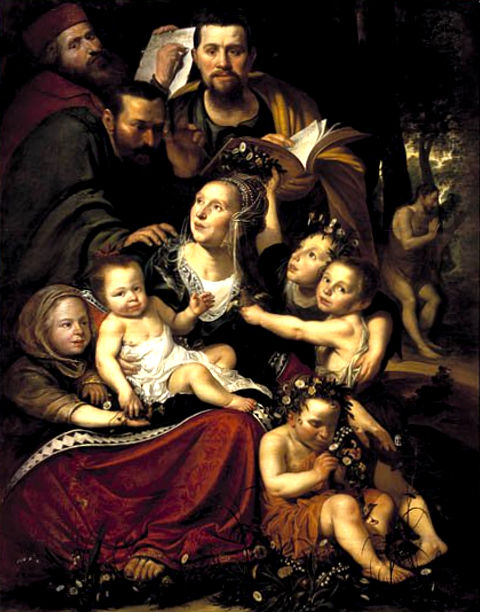 Op dit groepsportret wordt de `caritas', de liefde, een van de drie christelijke deugden, uitgebeeld door een vrouw omgeven door kinderen. De man links achter is waarschijnlijk haar echtgenoot. In de linker bovenhoek heeft de schilder zichzelf afgebeeld als de evangelist Lukas, patroon der schilders. Hij schrijft een tekst: `Ick heb dit ... int iaer ons heeren 1623 ... september in Amstelredam'. Geheel rechts staat Johannes de Doper. Rechts van hem waren toehoorders te zien, maar doordat het paneel is ingekort zijn die verdwenen. De man met het boek achter de vrouw stelt waarschijnlijk Paulus voor, die in zijn geschriften de nadruk legt op de deugd der liefde.